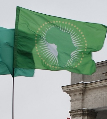 Флаг во время митинга 23 февраля 2012 года на ВВЦ